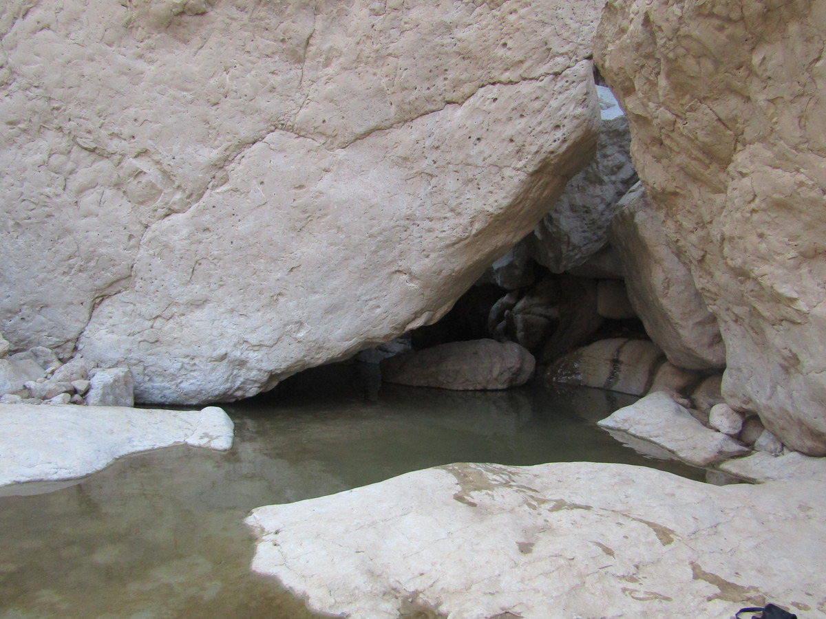 מעיין יפה הנובע כל השנה בין הסלעים